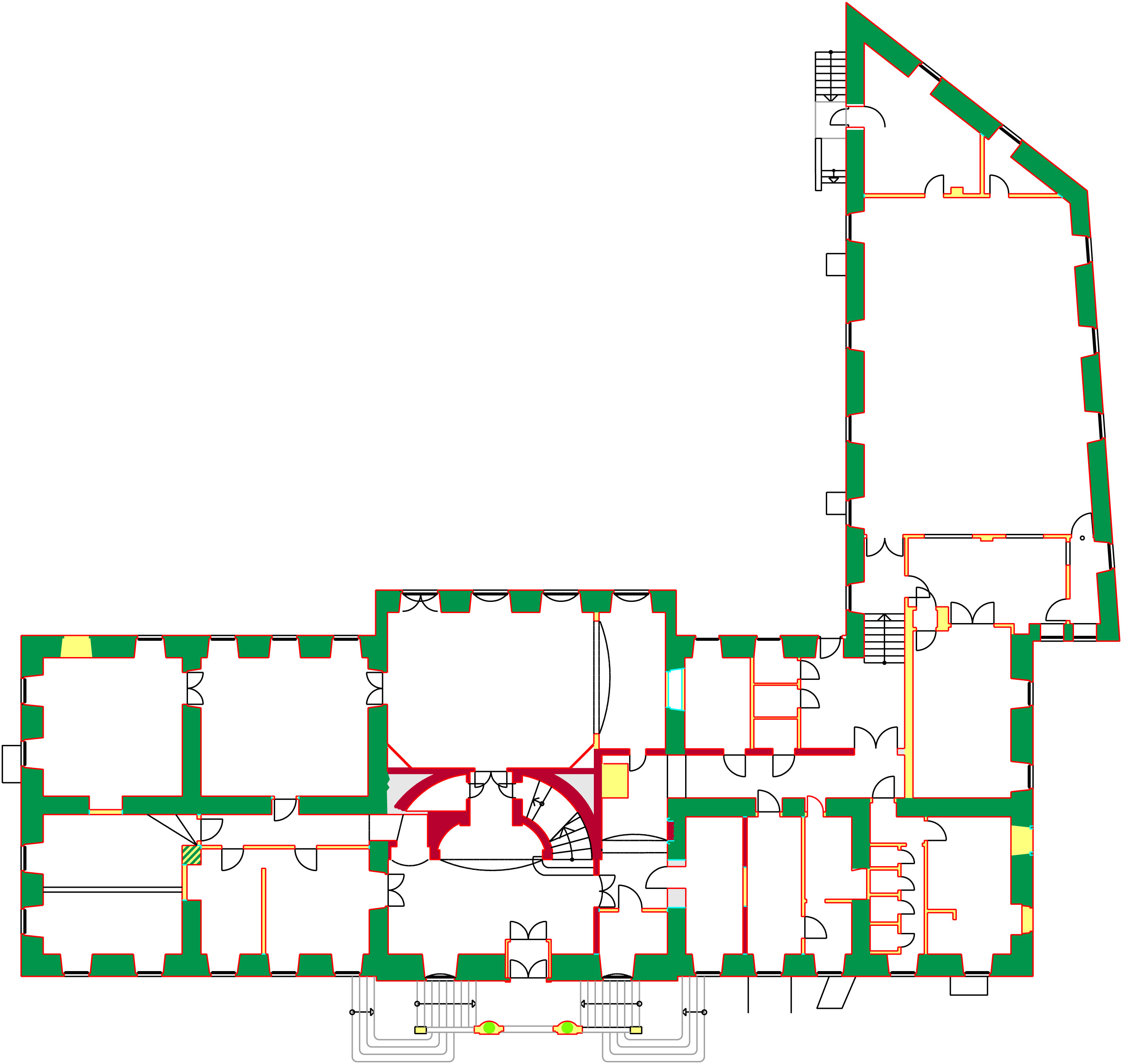 Erdgeschoß Grundriss mit historischen Bauepochen, Schloß Mutzschen, Landkreis Leipzig